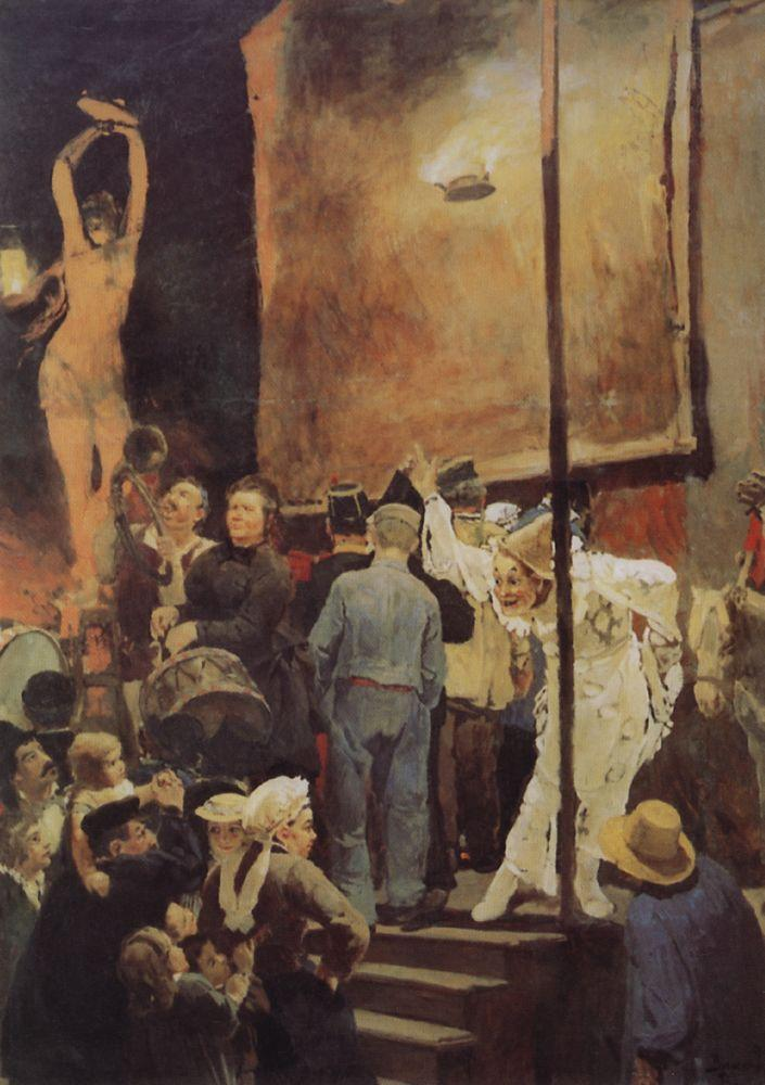 Акробаты (На празднике в окрестностях Парижа)